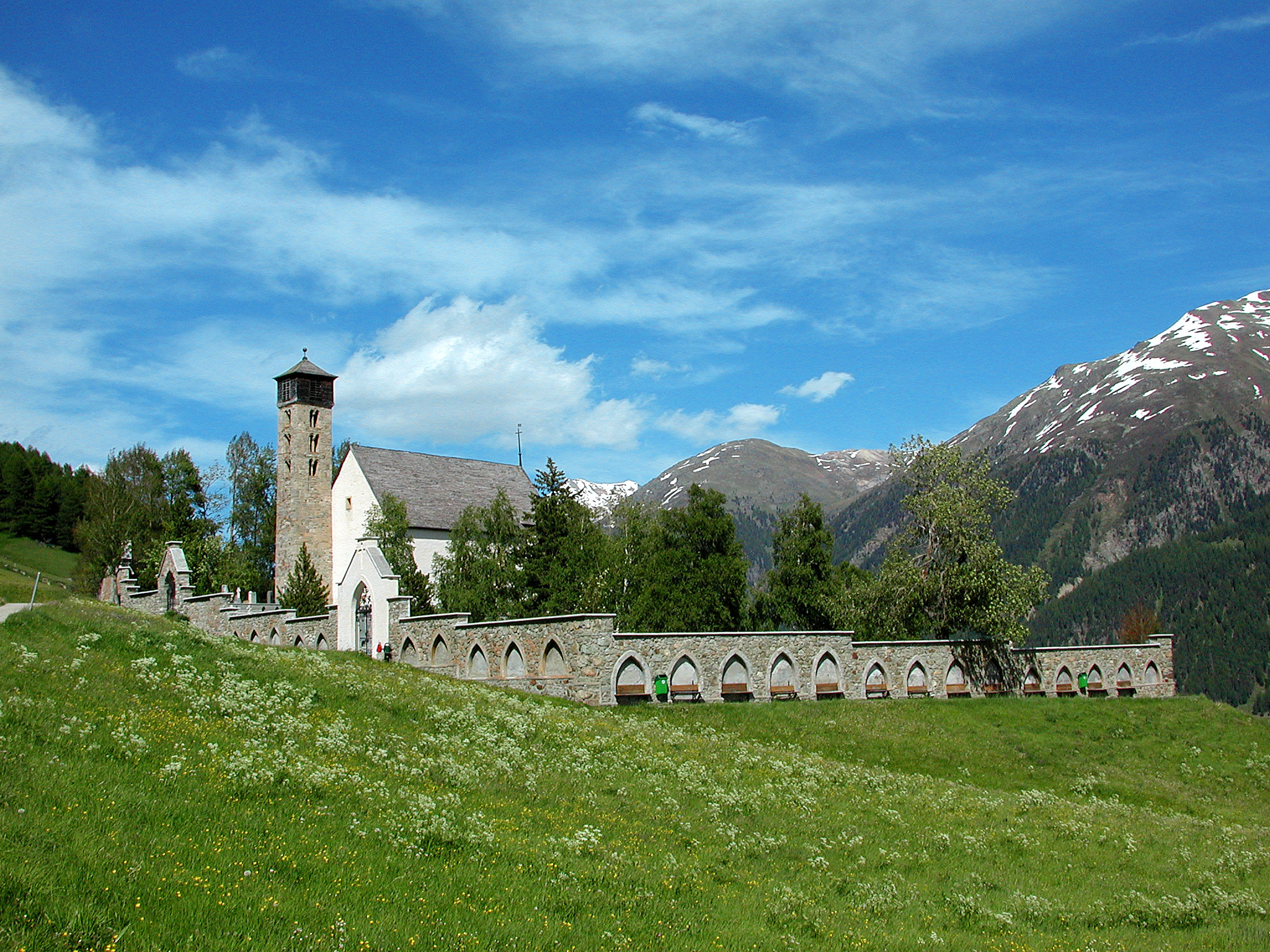 reformierte Kirche St. Peter in Samedan (Kanton Graubünden)